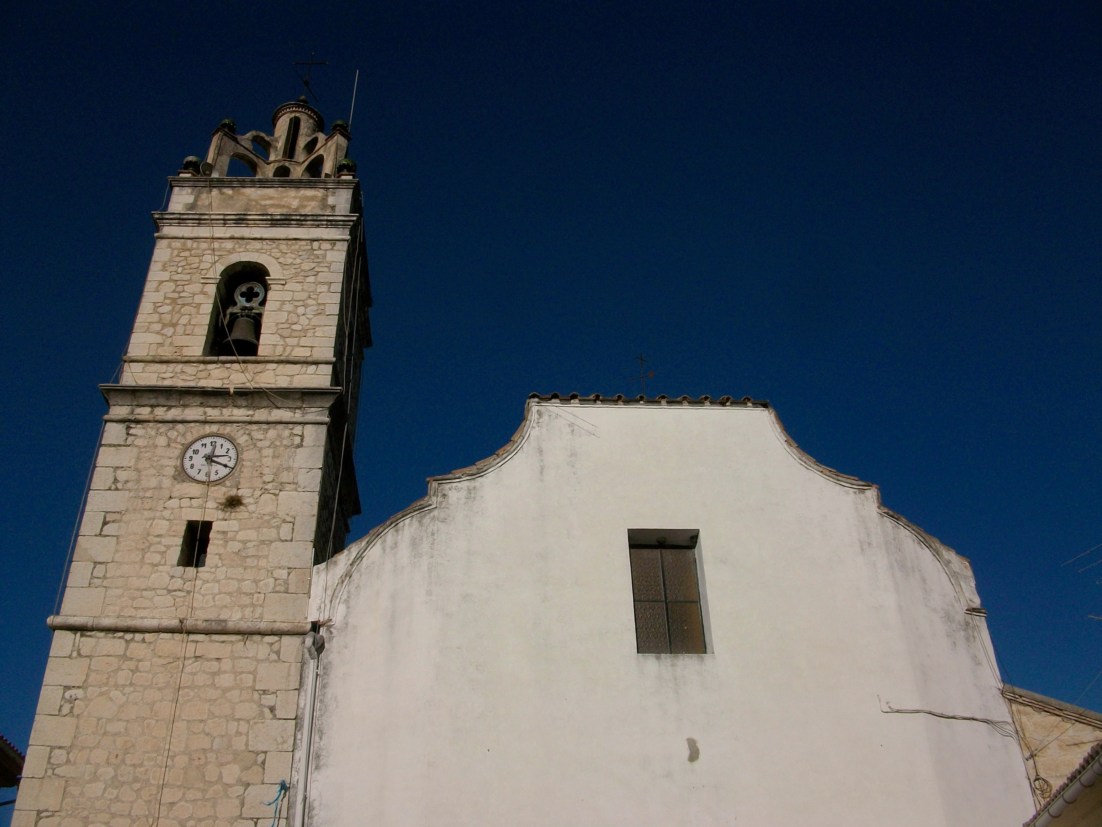 Església de sant Miquel, la Vall d'Ebo.